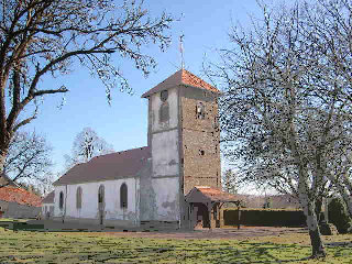 Église de Grosmagny (Territoire de Belfort)